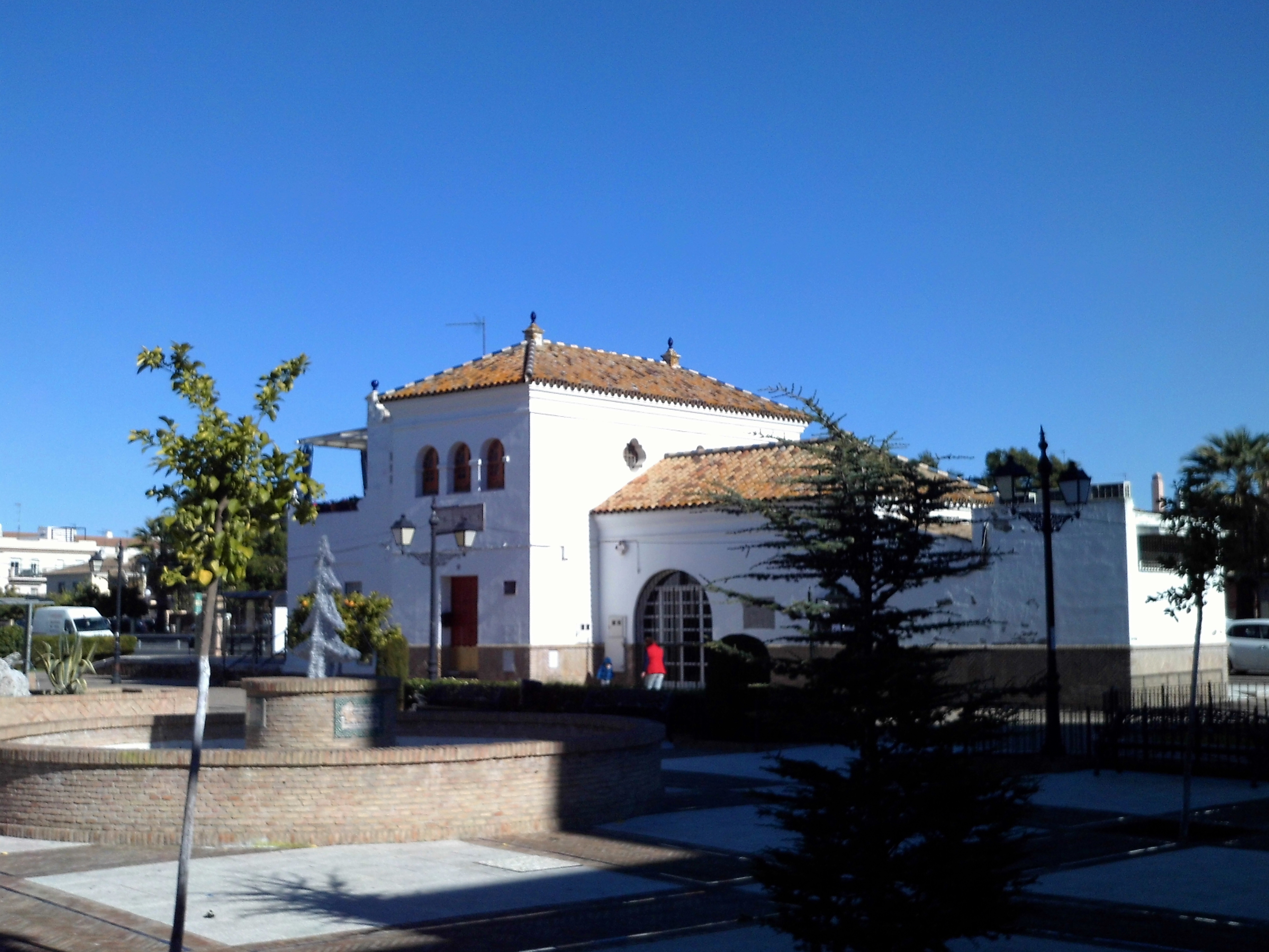 Antigua estación de tranvías. Gelves. Provincia de Sevilla, Andalucía, España.